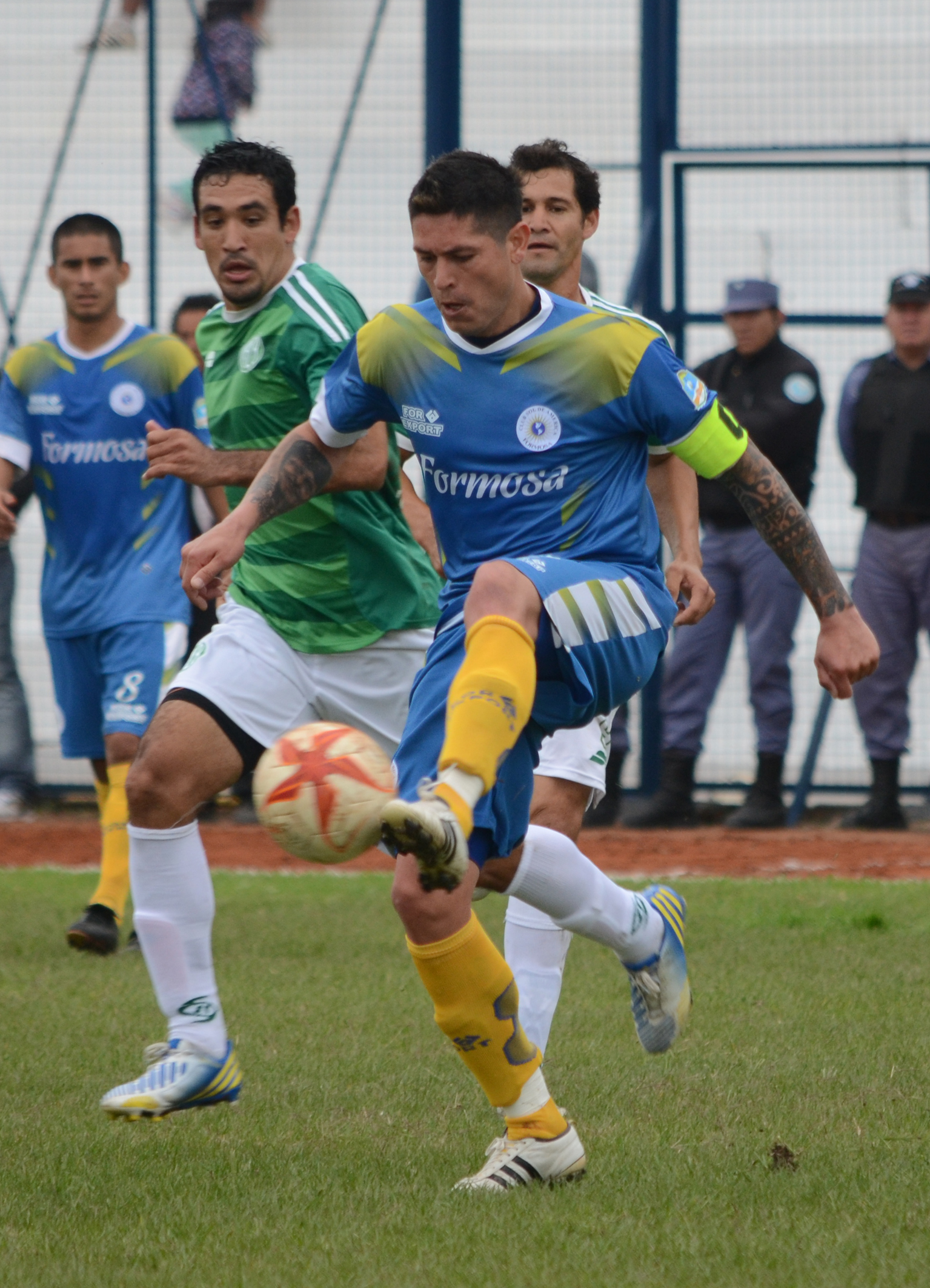 Paulo Centurión en el Club Sol de América (Formosa) enfrentando a Atlético Laguna Blanca